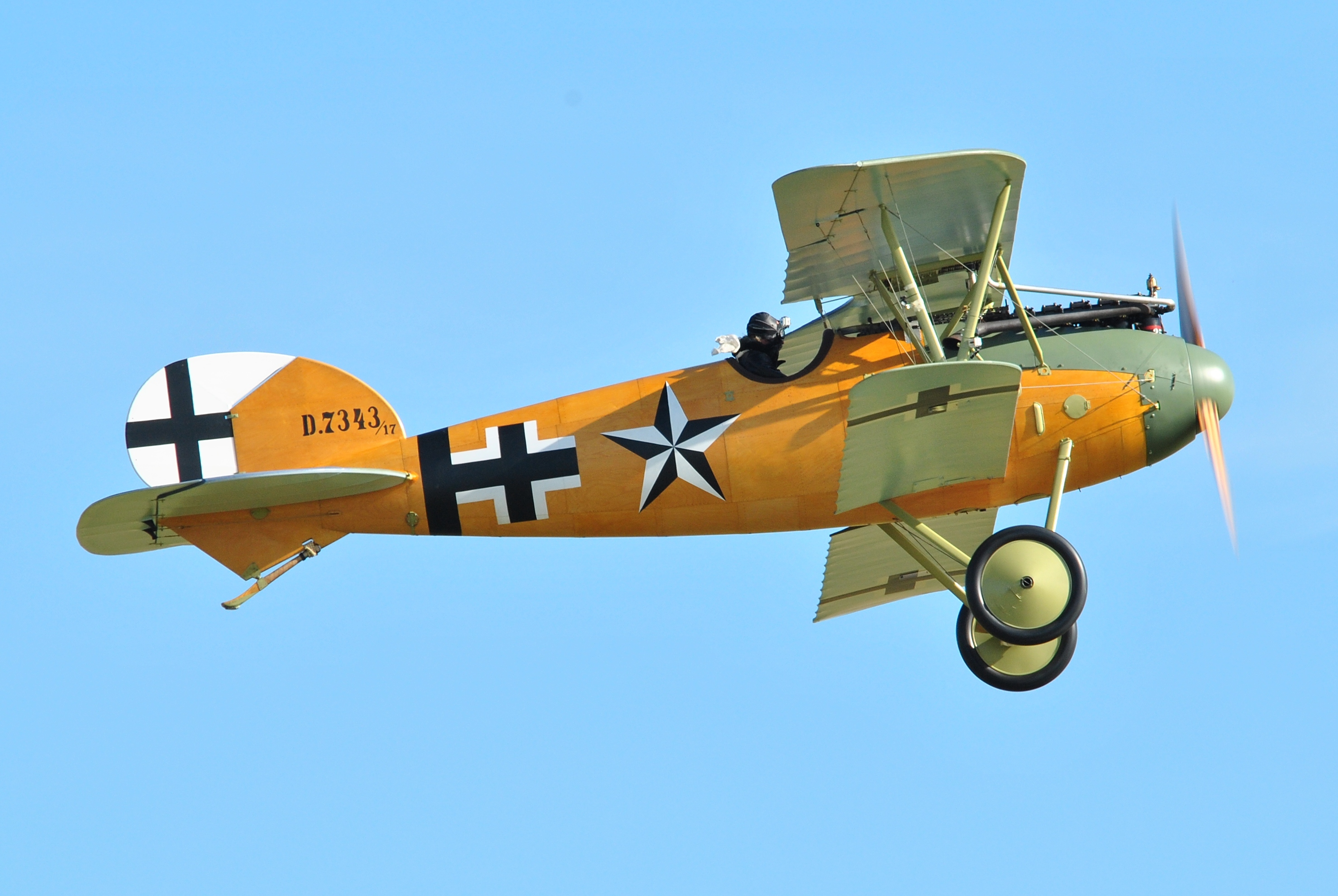 Albatros D.Va